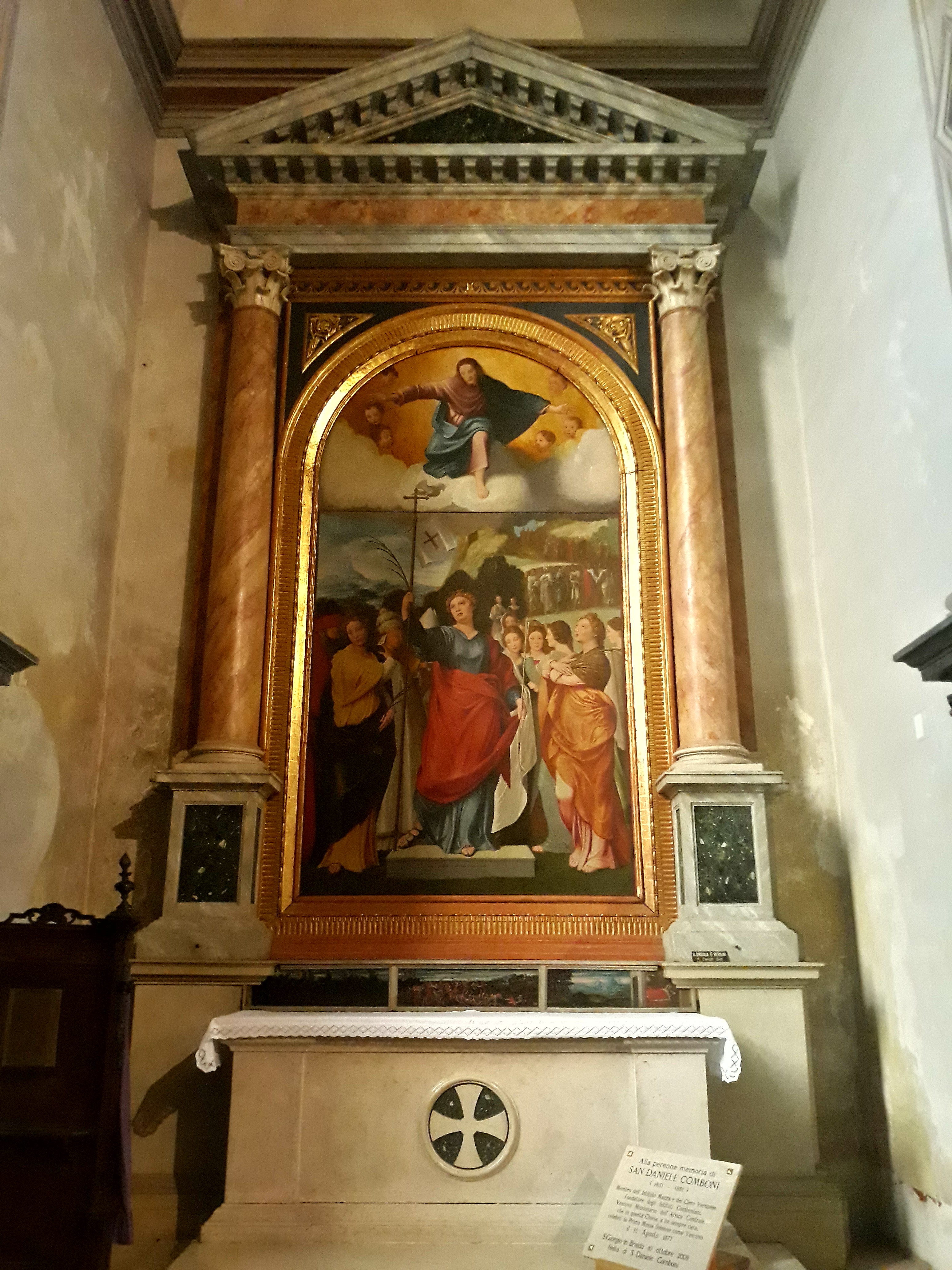 Altare di Sant'Orsola a san Giorgio in Braida a Verona. 1° cappella laterale di sinistra